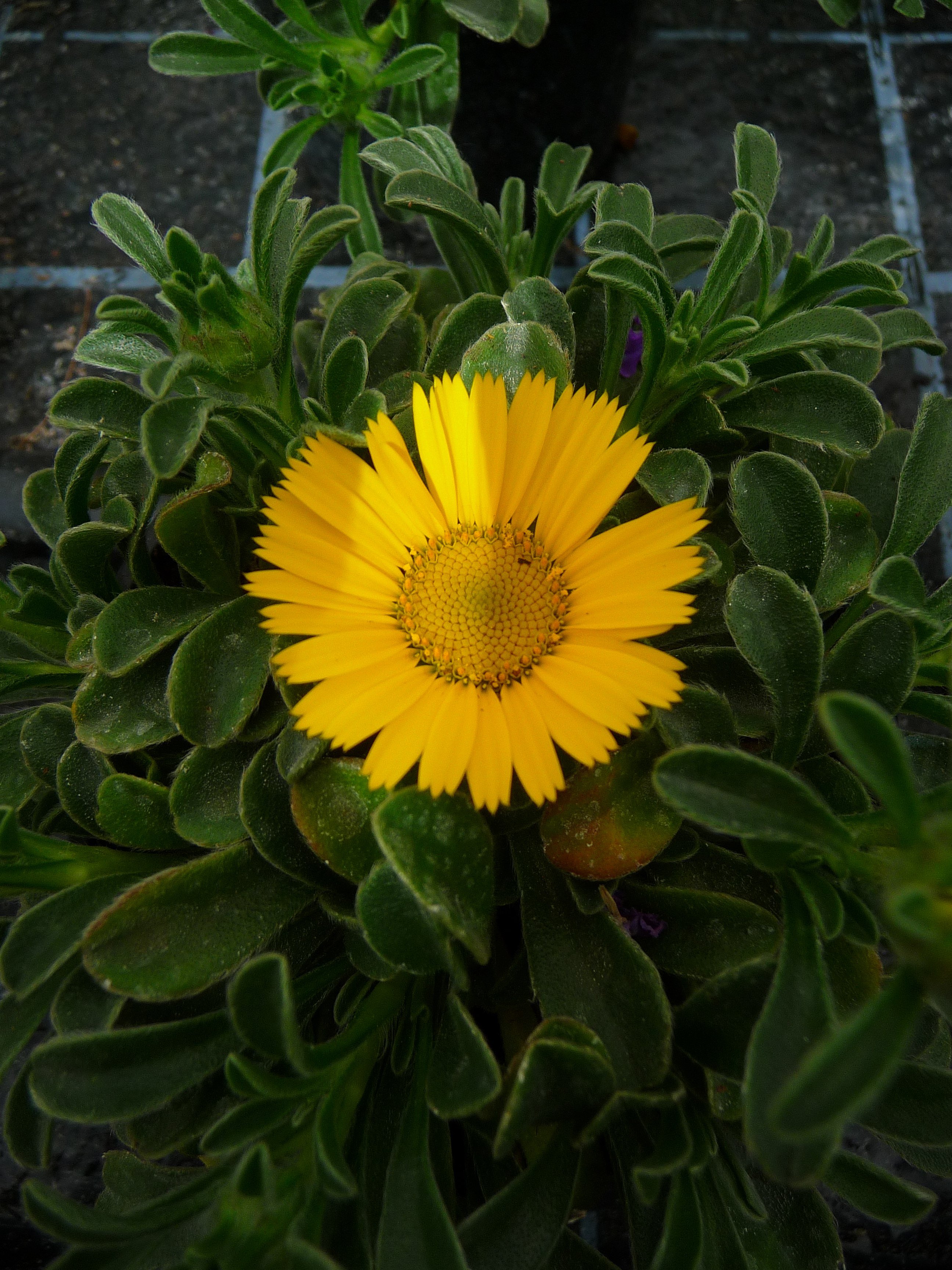 Küstenstrandstern (Pallenis maritima), fotografiert in einer Gärtnerei in Baden-Württemberg (Deutschland)